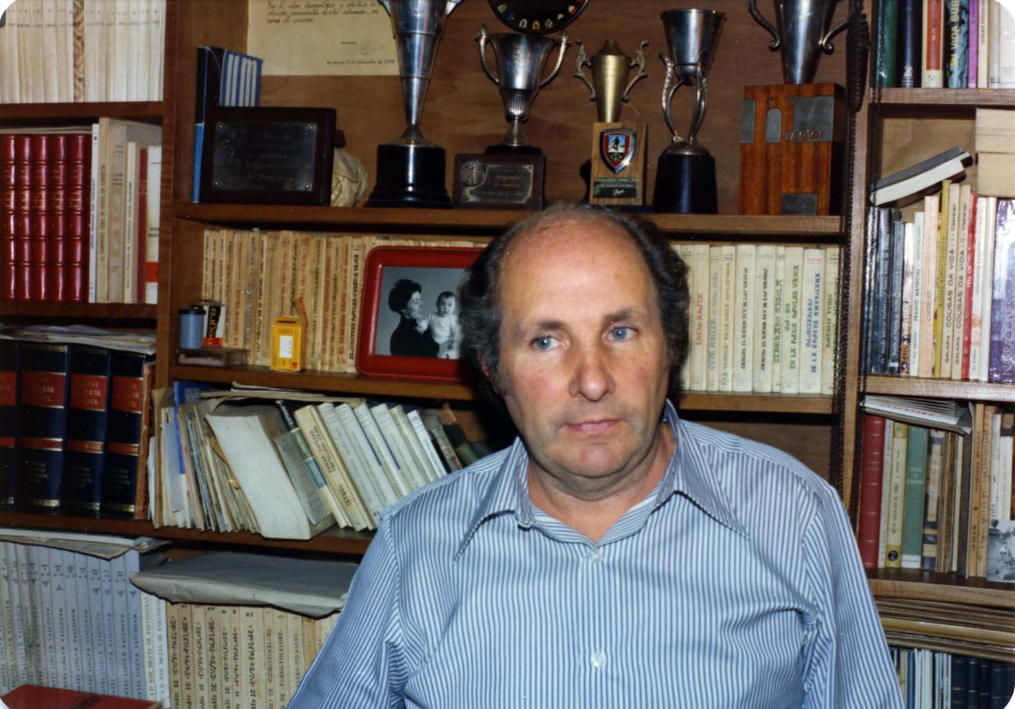 Juan San Martin Mekola kaleko bere etxeko bulegoan. 1976.